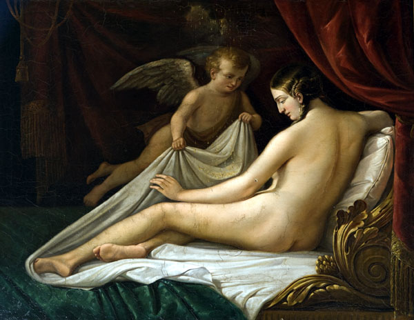 La obra representa a Dánae, hija de Acrisio, rey de Argos, y amante de Zeus.